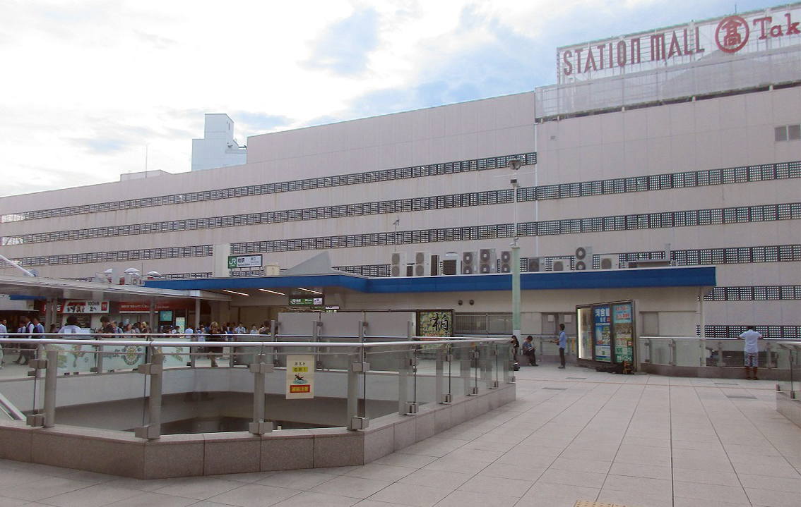 柏駅東口(cropped)